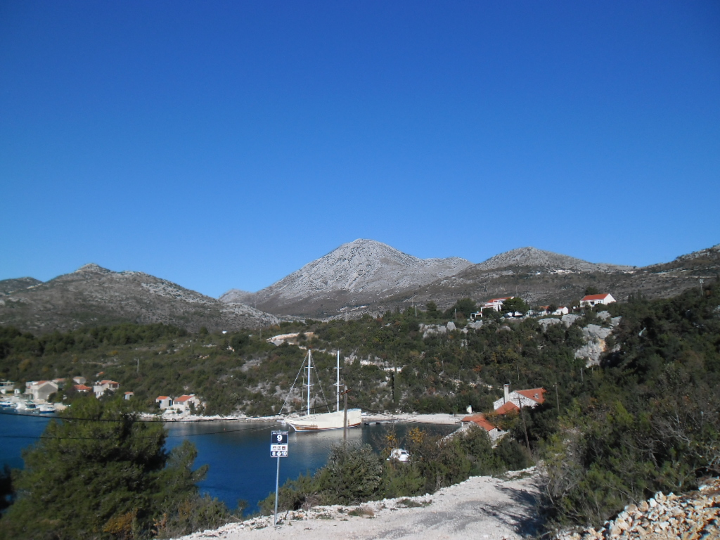 Banići